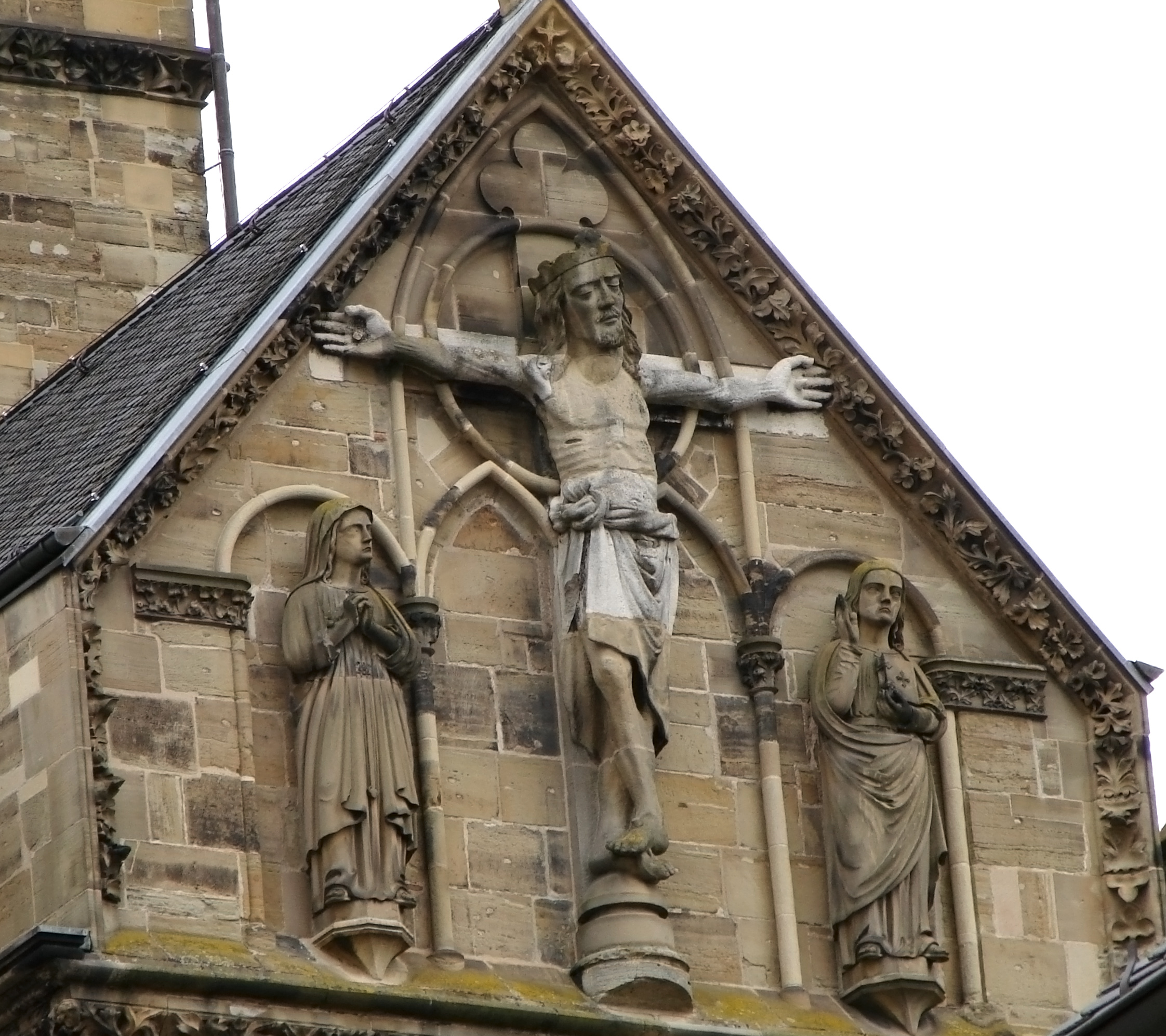 Crucifixion, façade de l'église Notre-Dame de Trèves.